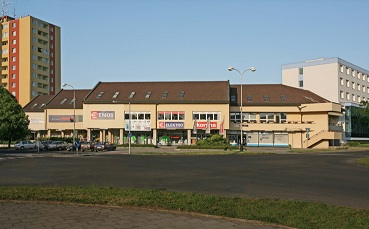 Sídlo společnosti